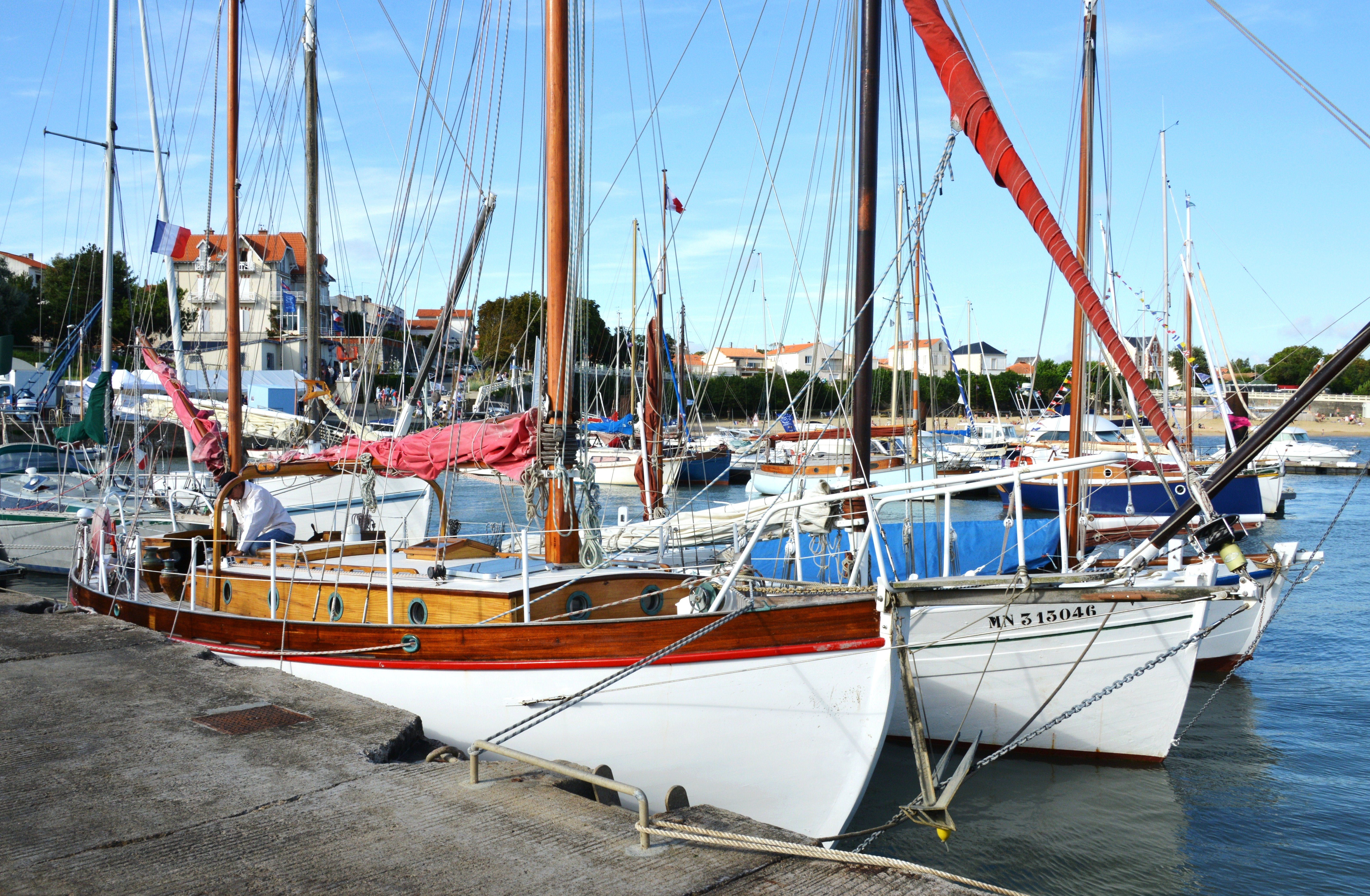 Le ketch « NAGA-LEE » en escale et amarré dans le Port Sud de Fouras lors du rassemblement de vieux gréements dans le cadre de la manifestation nautique de la Route de l’Huitre (quatrième édition) en juillet 2014. Le « NAGA-LEE » est un ketch de type carol ketch (inspiré par les plans de l’architecte naval John G. Hanna). Il a été construit en 1971. Il mesure 11,17 mètres de long et 3,65 mètres de large. Tirant d’ eau 1,35 mètre. Sa coque est en bois. Immatriculation : LR 612814. Fouras-les-Bains, Charente-Maritime, France.